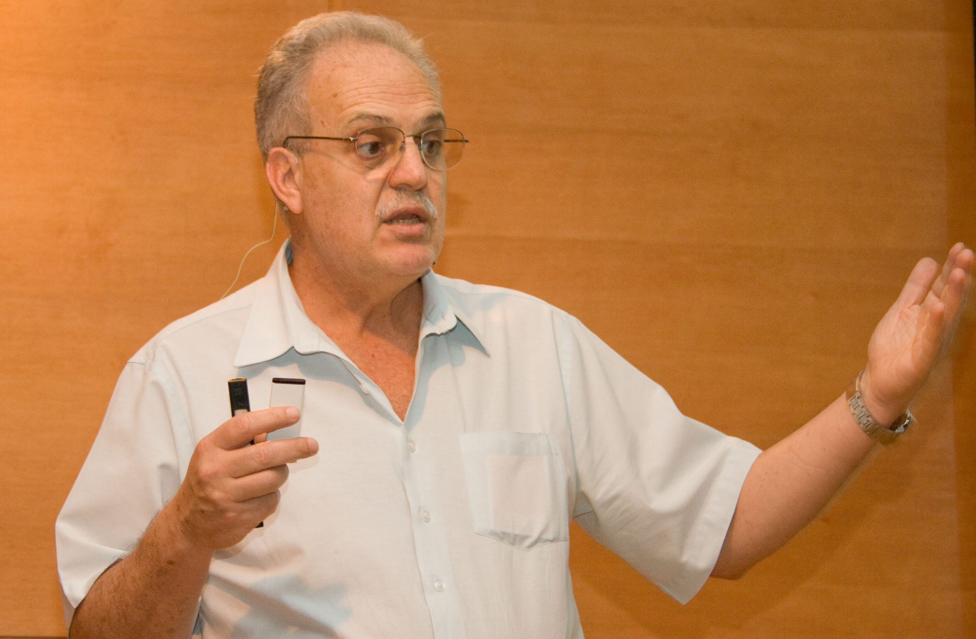 Café Filosófico com Carlos Nobre em Ribeirão Preto 17/09/09 Fotógrafo: Renato Lopes